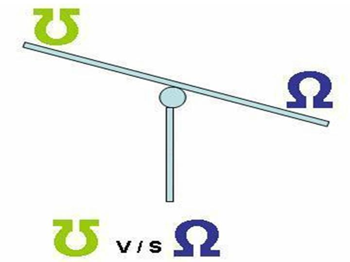 Mho y Ohm